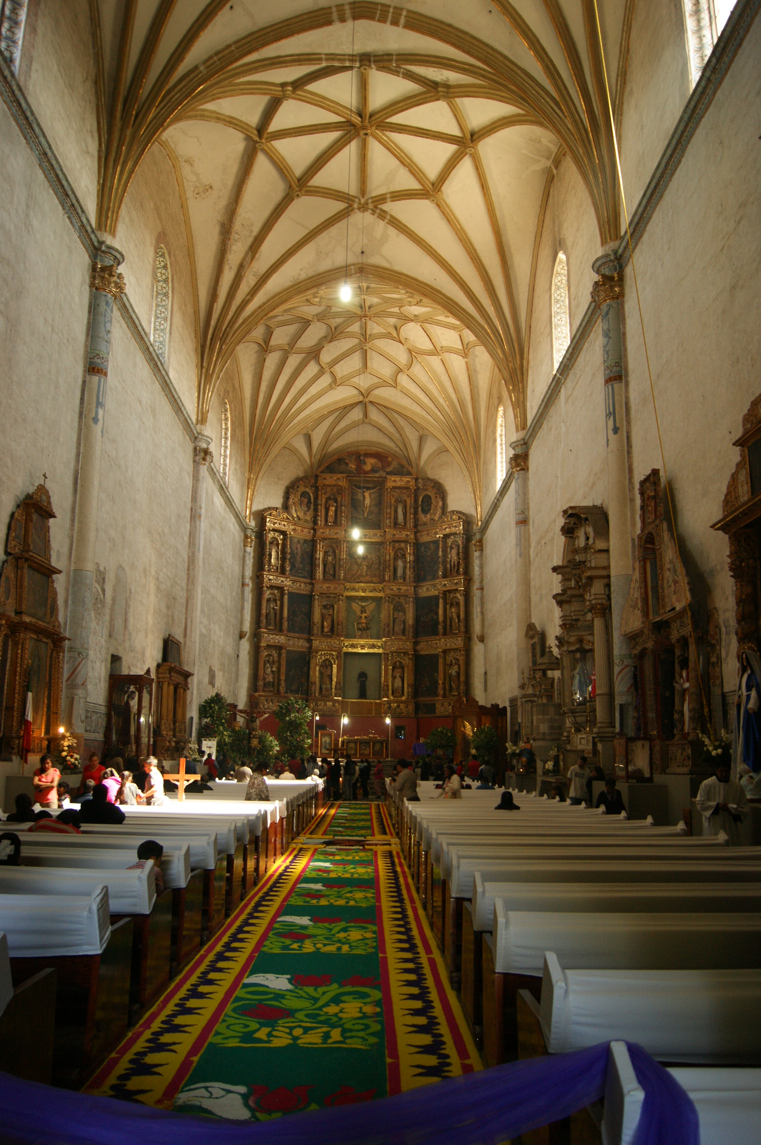 Convento de San Miguel Arcángel en Huejotzingo, Puebla